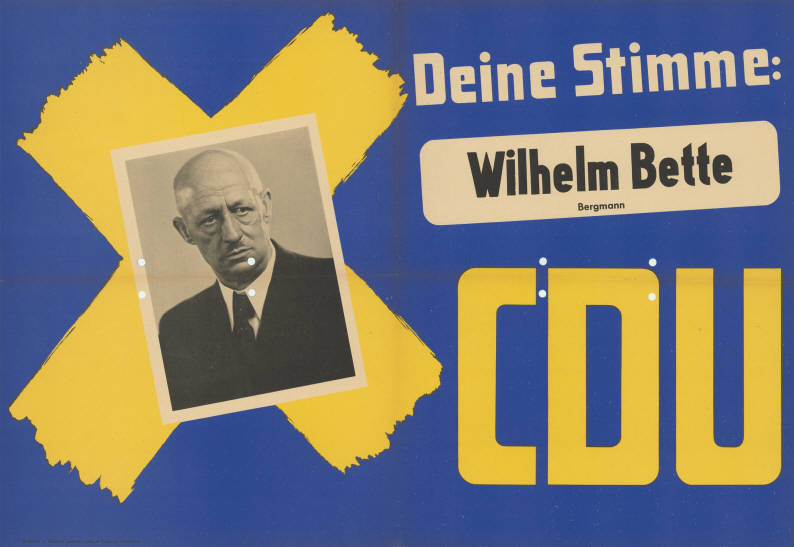 Deine Stimme: Wilhelm Bette Bergmann CDU Abbildung: Porträtfoto - Stimmkreuz Plakatart: Kandidaten-/Personenplakat mit Porträt Objekt-Signatur: 10-009 : 154 Bestand: Landtagswahlplakate Nordrhein-Westfalen (10-009) GliederungBestand10-18: Landtagswahlplakate Nordrhein-Westfalen (10-009) » Landtagswahl am 18.6.1950 » CDU » mit Porträtfoto Lizenz: KAS/ACDP 10-009 : 154 CC-BY-SA 3.0 DE